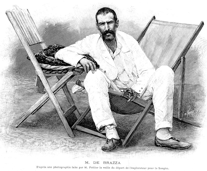 Explorer Wikipedia:Pierre Savorgnan de Brazza. Caption: "Le retour de M. de Brazza. L'Illustration du 23 Février 1895". Notation: "M. DE BRAZZA, D'apres une photographie faite par M. Pottier la veille du depart de l'explorateur pour la Sangha" ("According to a photograph made by Mr. Pottier before departure of the explorer for Sangha").